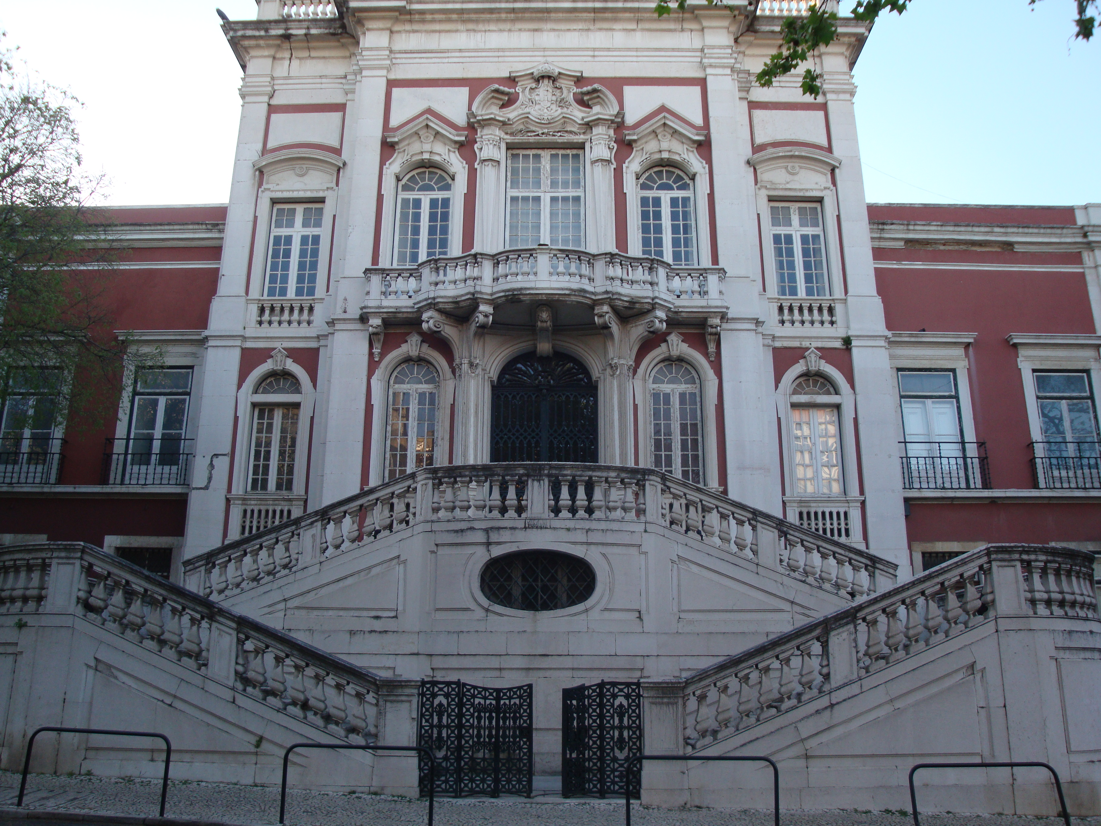 Palácio da Bemposta, em Lisboa.